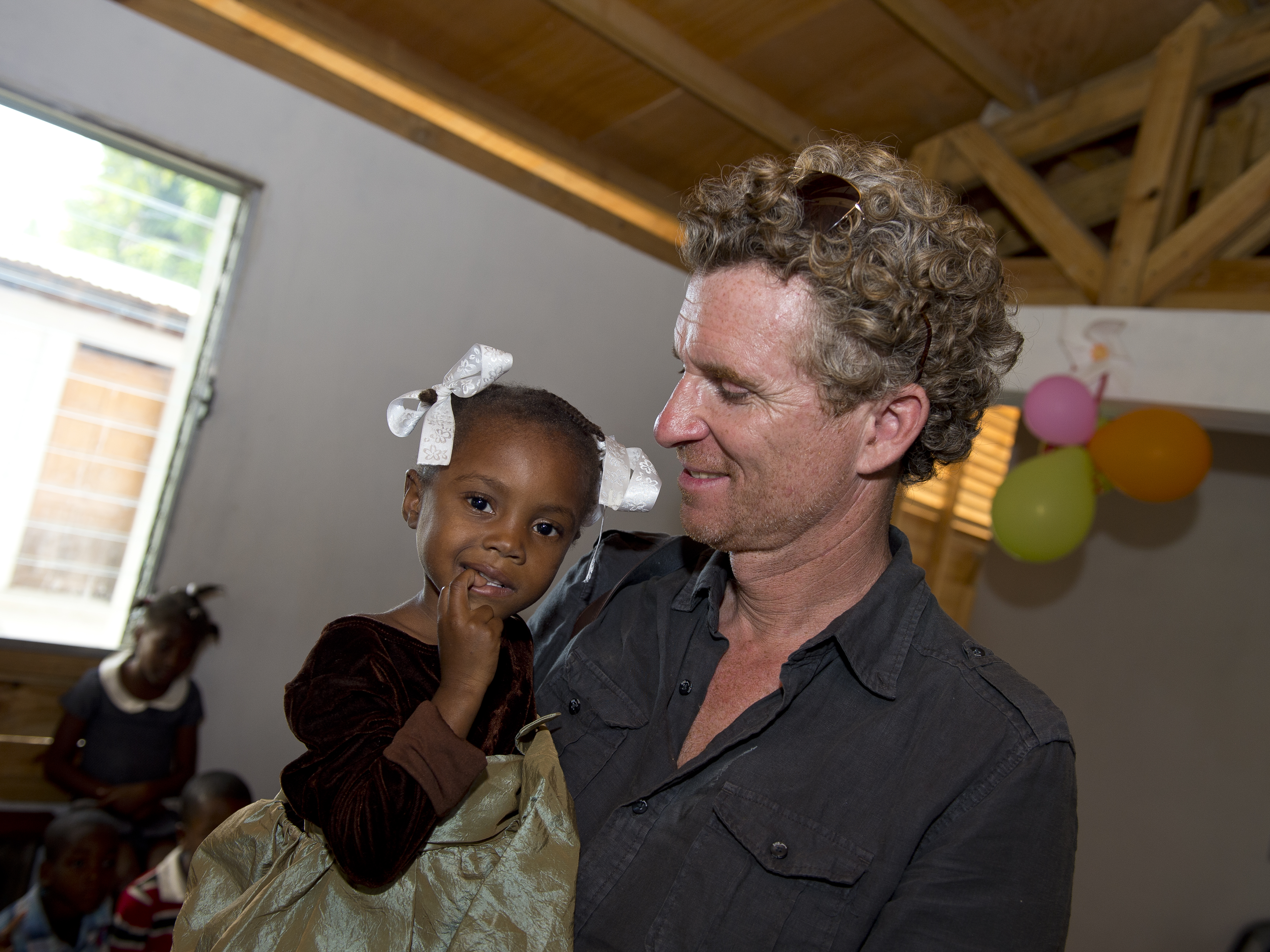 Visite de l'orphelinat coeur de la pitié